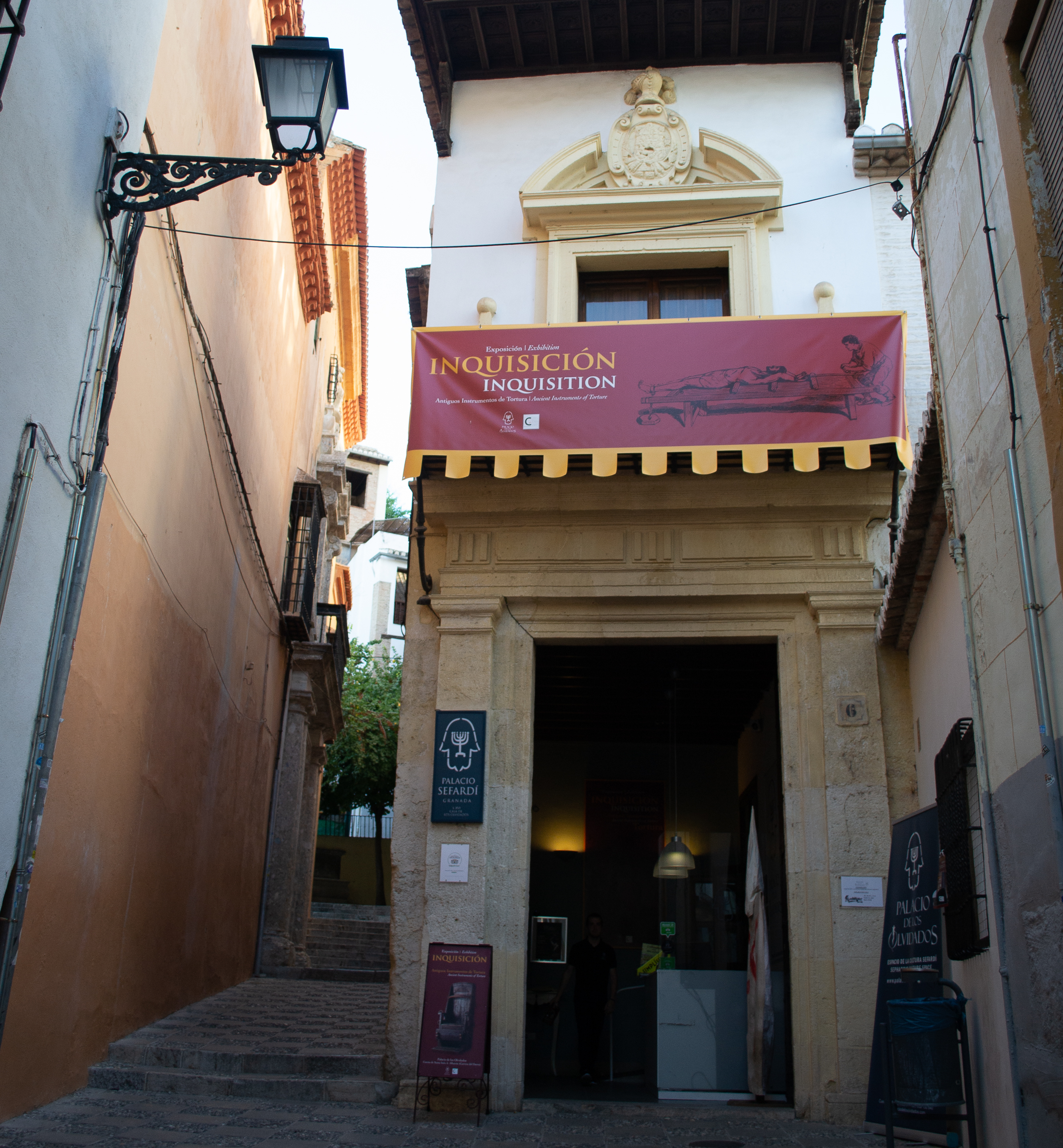 Palacio de los Olvidados en Granada, sede del museo de la Inquisición y del museo sefardí.